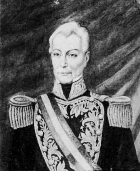 Francisco Antonio Pinto y Díaz de la Puente (Santiago, 23 de julio de 1785 - ibídem, 18 de julio de 1858) fue un abogado y militar chileno, presidente de la República entre 1827 y 1829. En esta última fecha le sobrevino una revolución conservadora, por lo que renunció a la presidencia y la dejó en manos de Francisco Ramón Vicuña